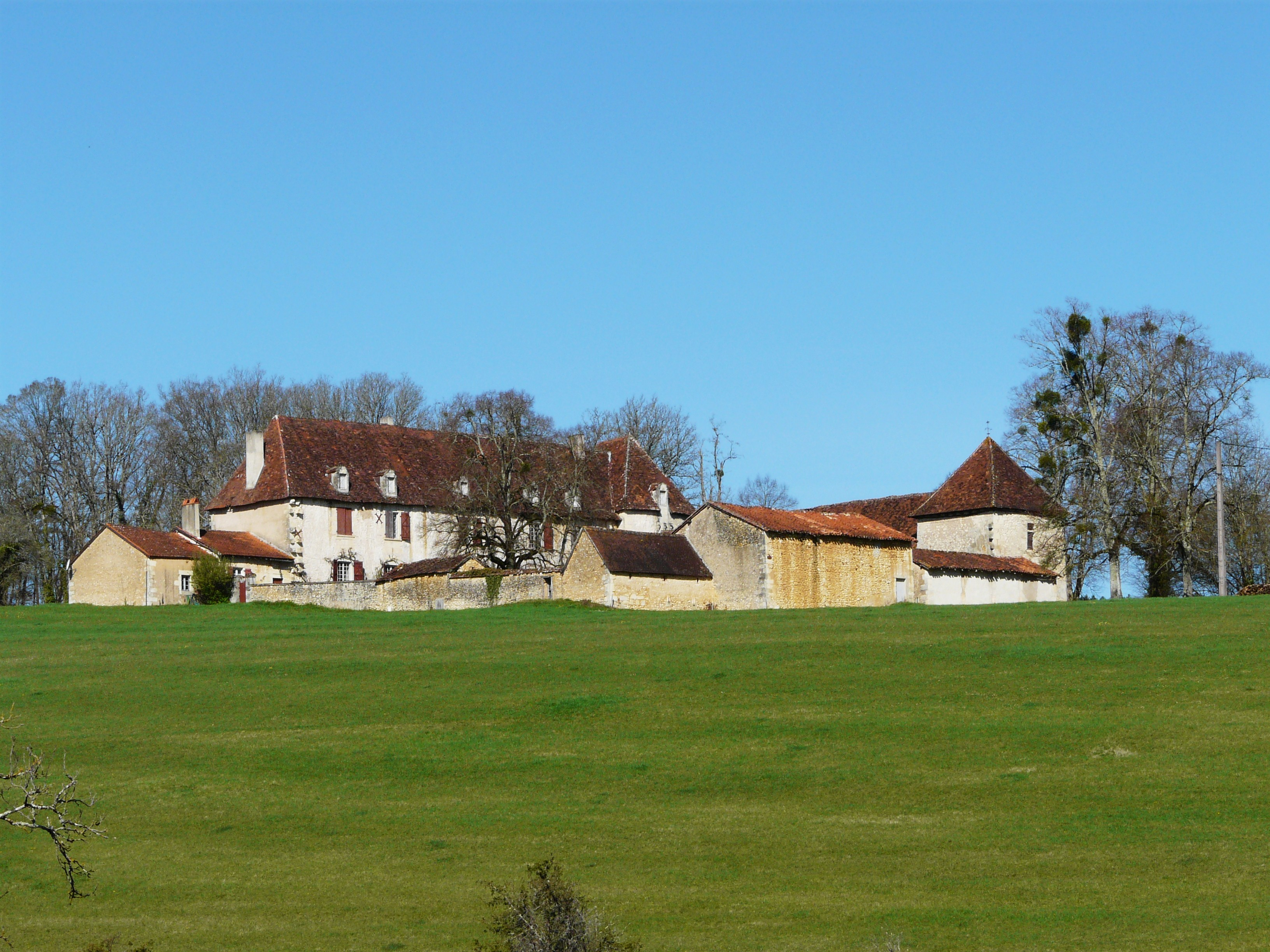 Le château de la Chalupie vu depuis le sud-est, Eyliac, Dordogne, France.